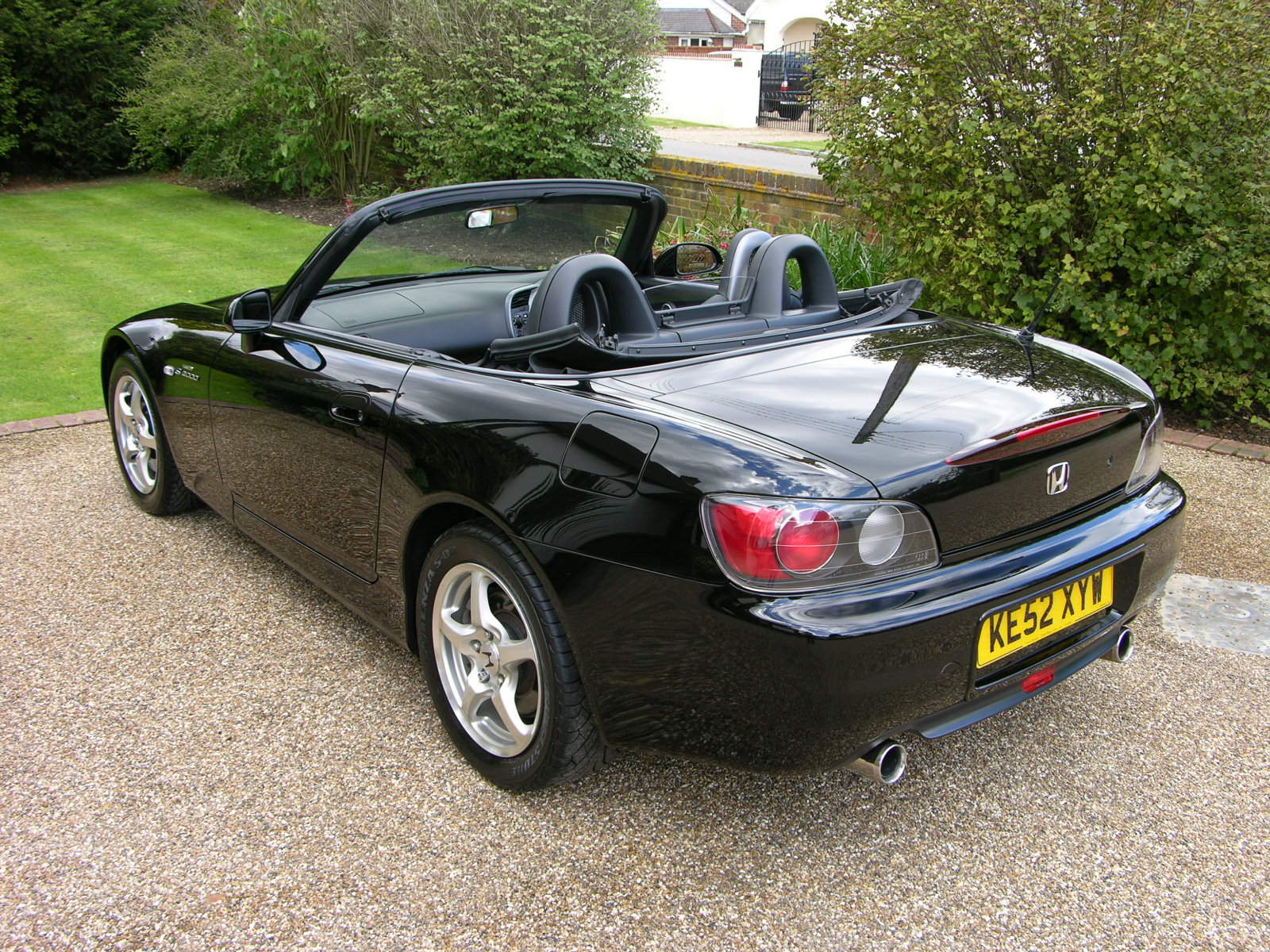 Honda S2000